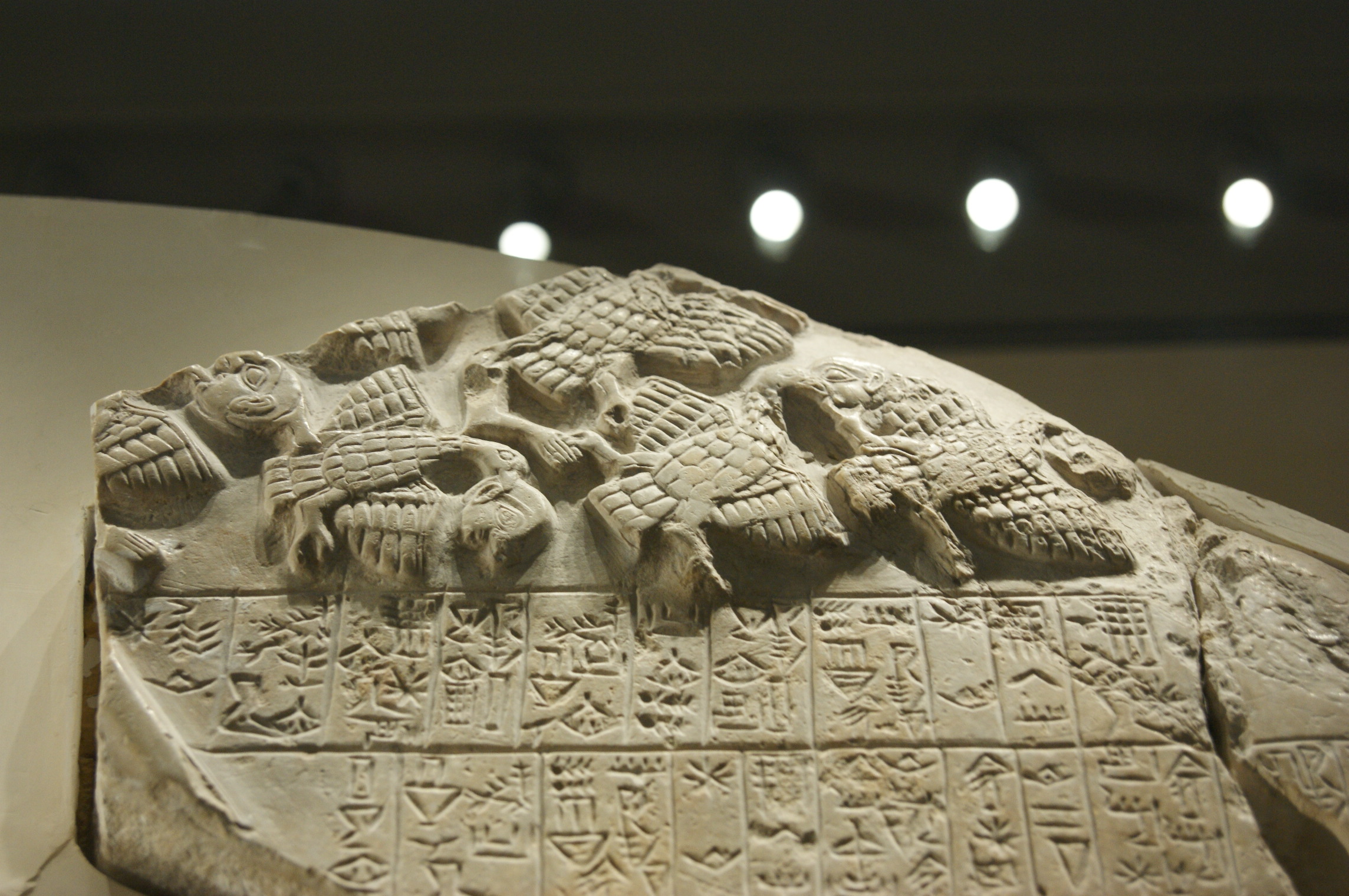 Selon le cartel et la base Atlas du musée du Louvre, cette stèle des Vautours est dédiée à la victoire d'Eannatum, roi des Lagash sur son rival Umma. Elle est gravée dans le calcaire et date de la période des dynasties archaïques, vers 2450 av JC. Elle a été mise au jour lors des fouilles de Tello (ancienne Girsu) par E. de Sarzec en 1881 (plus un fragment provenant du British Museum). Numéro d'inventaire : AO 16109, AO 50, AO 2346, AO 2348.